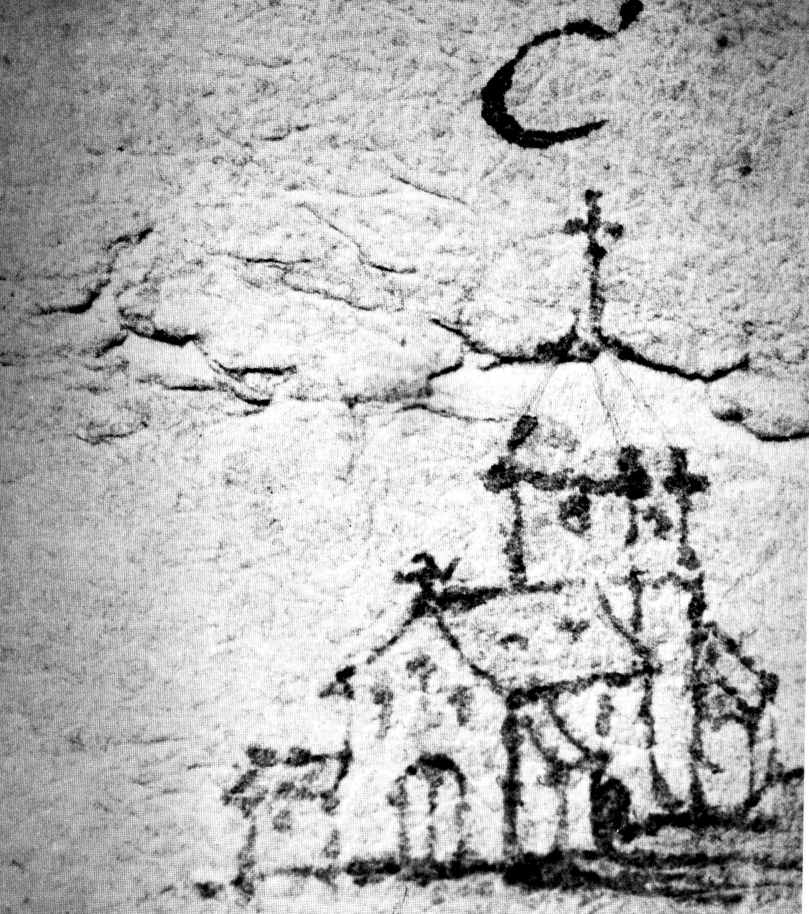 Zeichnung der Burgkunstadter Stadtpfarrkirche von 1747 (Skizze Teil des Flur- und Jagdriss des "Geometers Thalblitzer"